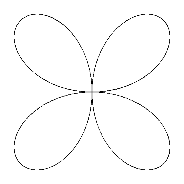 4 Petal rose curve.